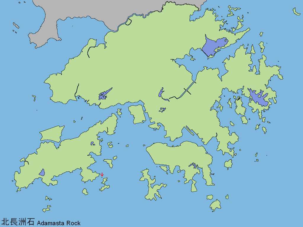 中文（香港）: 北長洲石。